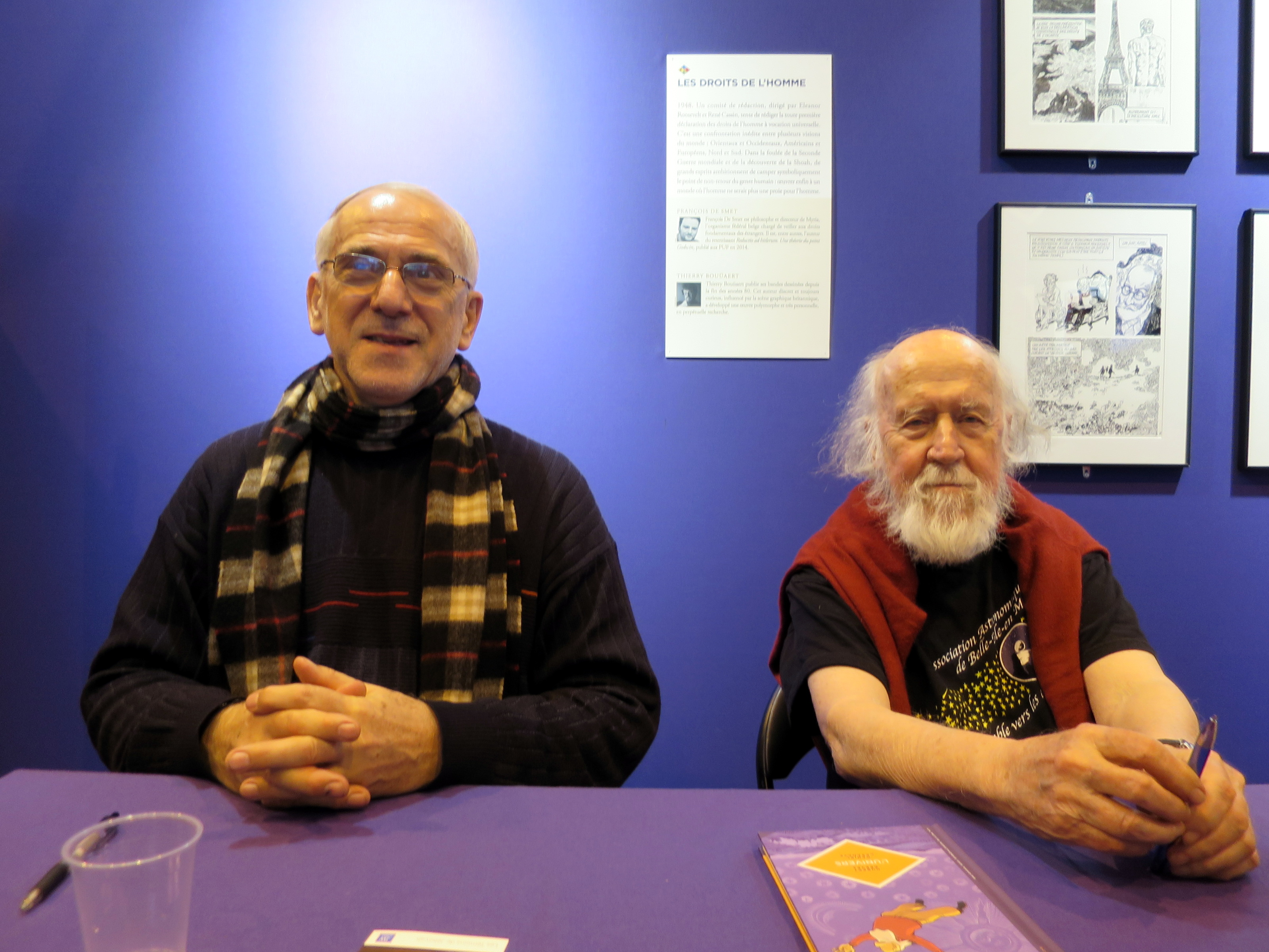 Bernard Séret et Hubert Reeves, au salon du livre de Paris 2016, en dédicace pour le lancement de la collection "Petite Bédéthèque des savoirs" par les éditions du Lombard.